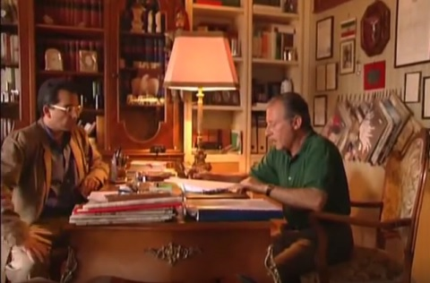 L'ultima intervista di Paolo Borsellino, rilasciata ai giornalisti francesi Jeanne Pierre Moscardo e Fabrizio Calvi (Canal+) il 21 maggio 1992, due giorni prima dell'uccisione di Giovanni Falcone e due mesi prima della morte di Borsellino